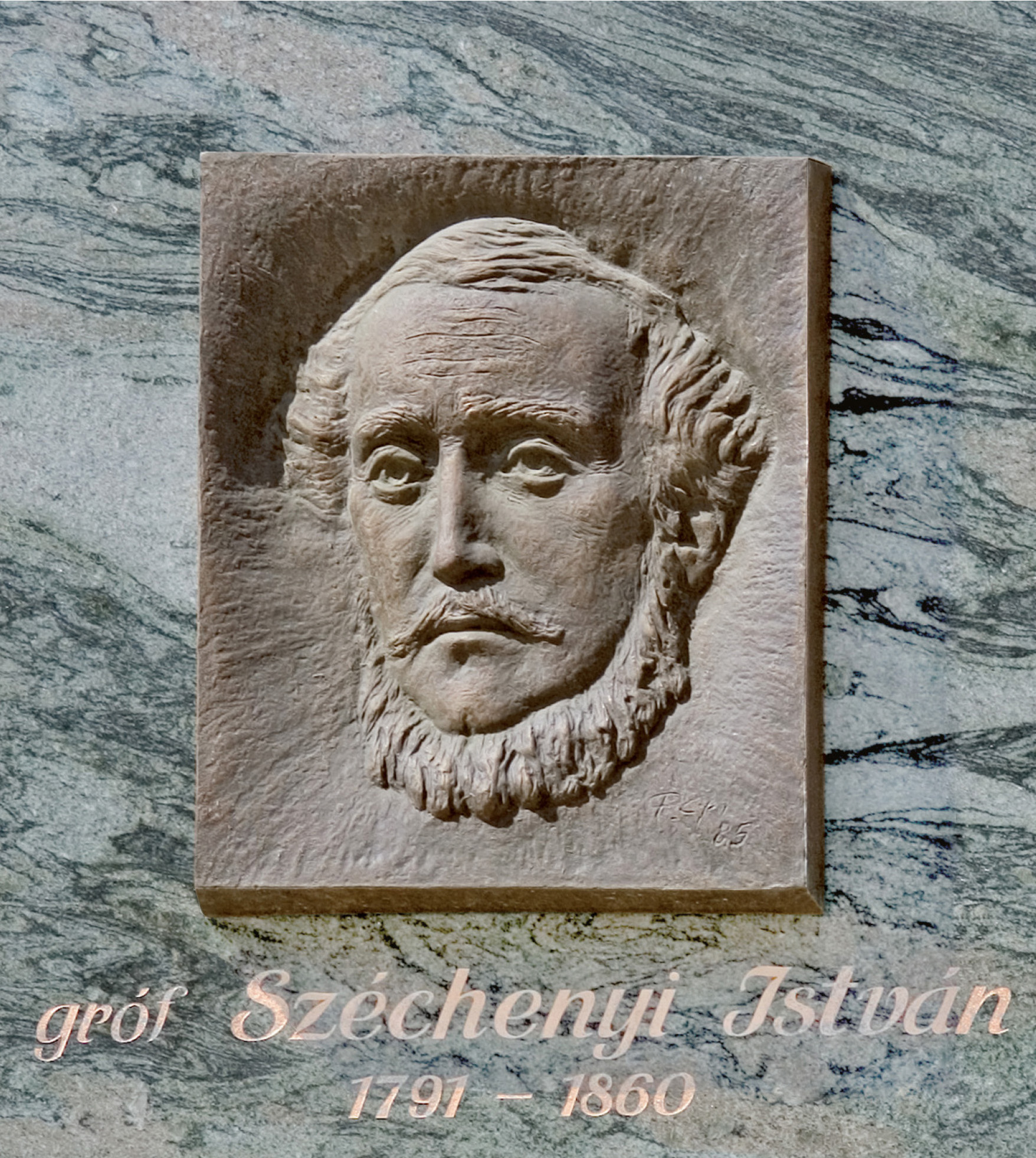 Széchenyi István bronz domborműve Budapesten (XI. ker.), a Széchenyi Gimnázium falán (75x95 cm), Pálfy Gusztáv alkotása (1986)